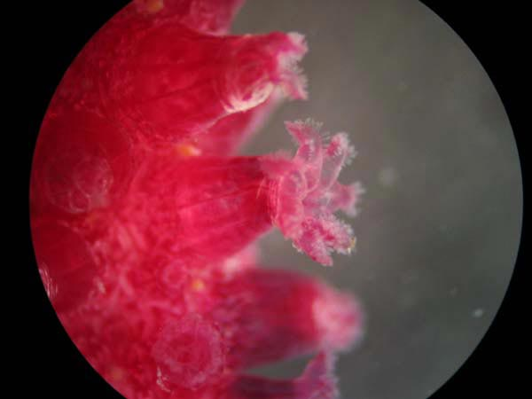 Pólipos de gorgonia roja aumentados 10x